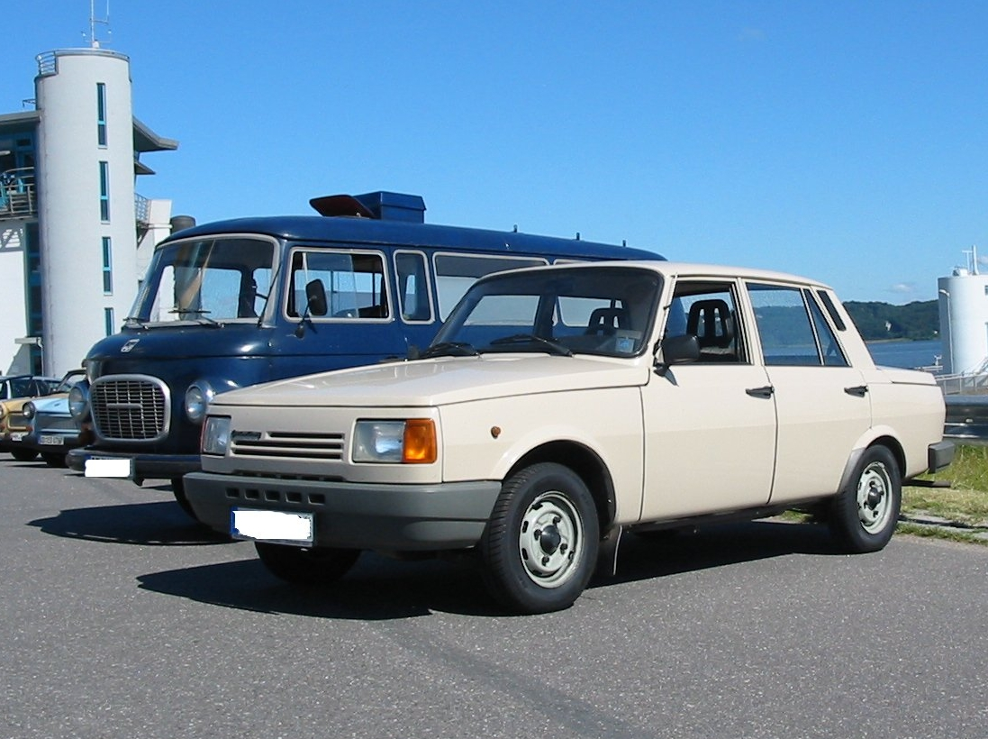 Wartburg 1.3 Limo - Standard, dahinter ein Barkas B1000